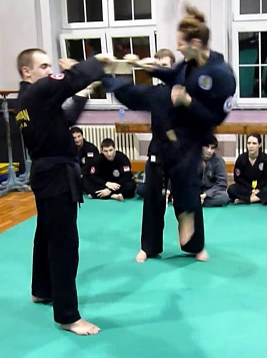 Irena bočni u skoku - 2011